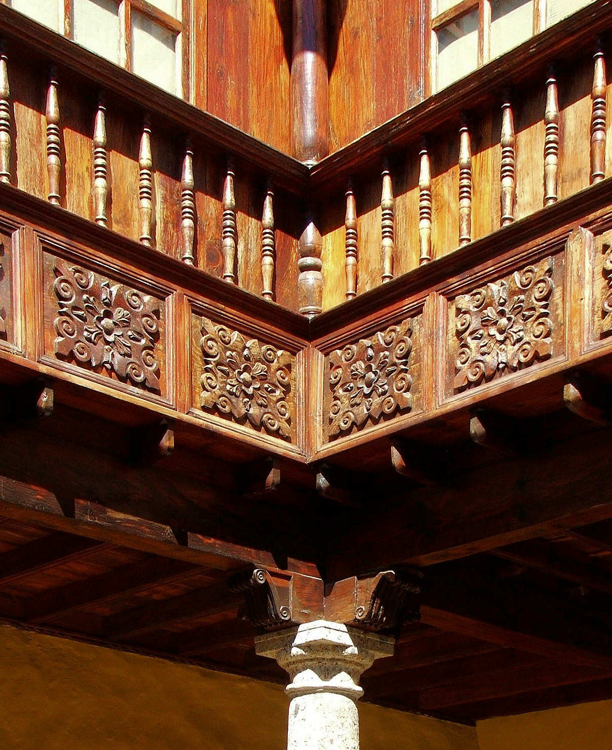 Casa Lercaro, Patio